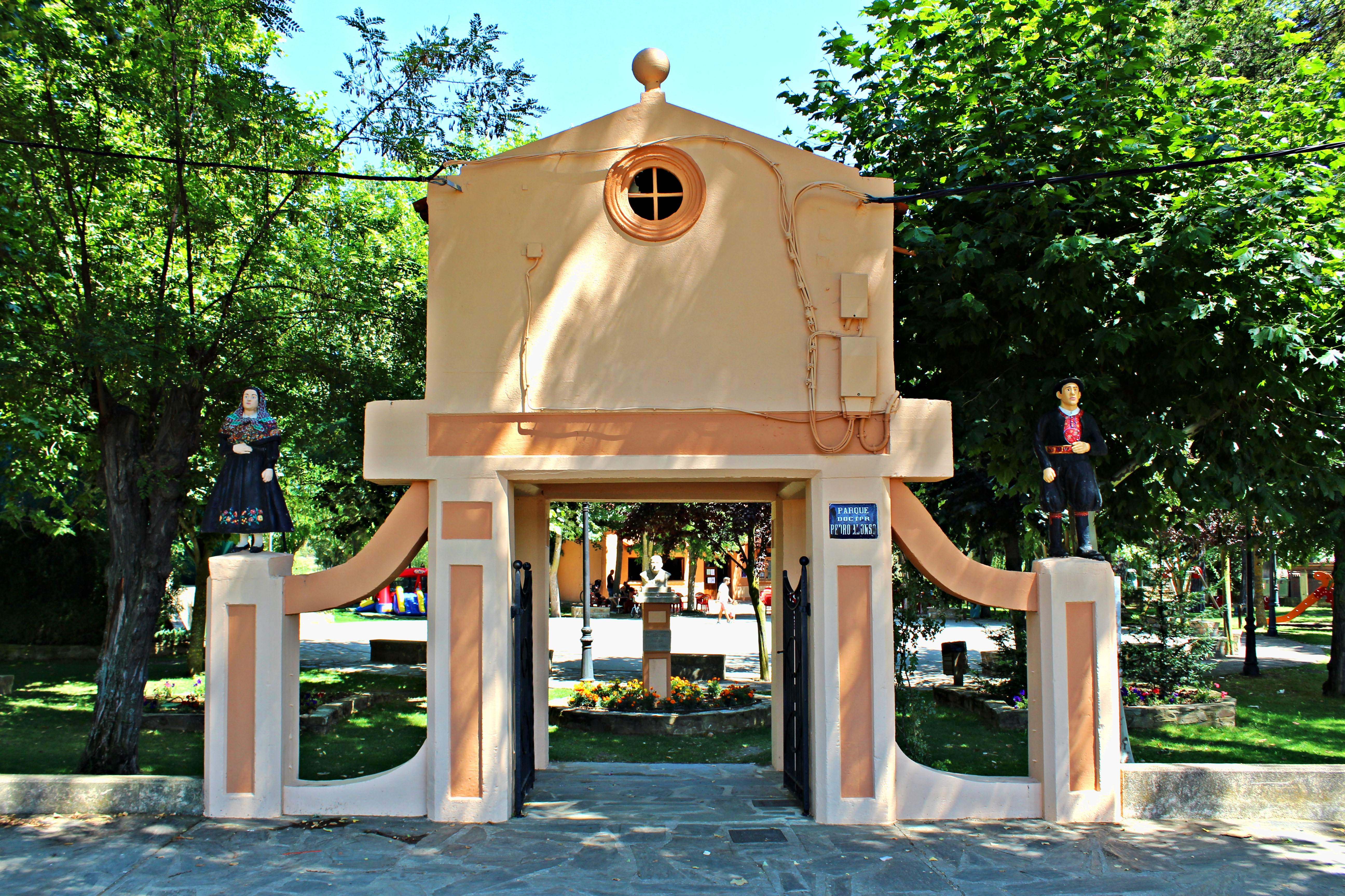 Val de San Lorenzo, la Maragatería, provincia de León.